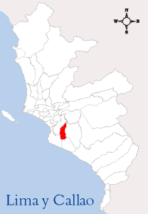 Localización del Distrito de San Juan de Miraflores